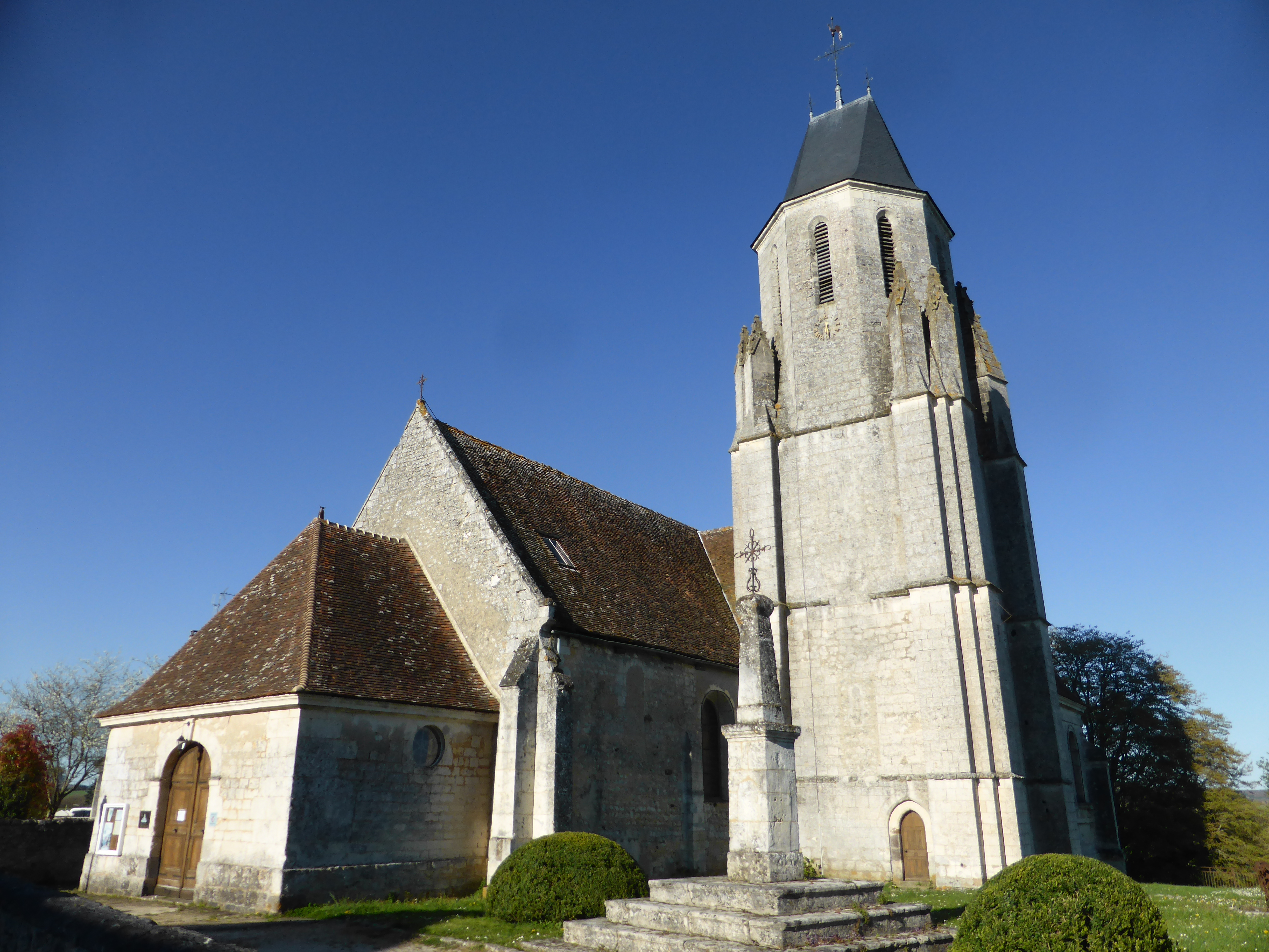 Église Saint-Pierre de Mauves-sur-Huisne, dans l'Orne.